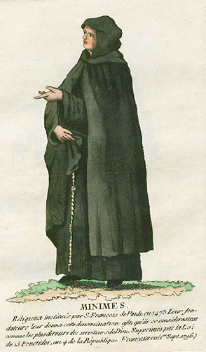 Collection de costumes de tous les ordres monastiques, supprimés à differentes époques, dans la ci-devant Belgique, Bruxelles, Philippe Joseph Maillart et sœur, 1811